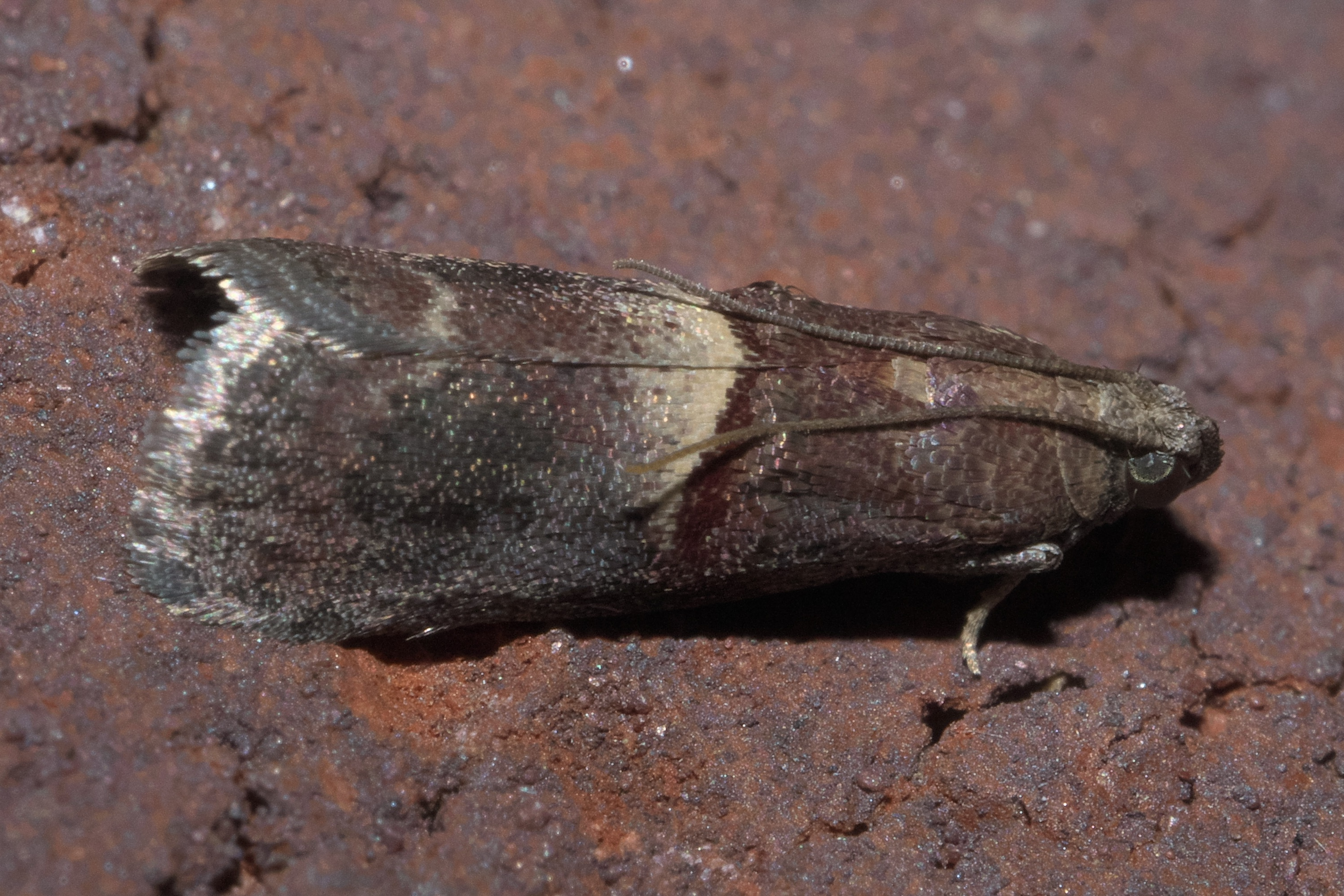 Acrobasis exsulella, cordovan pyralid, Size: 9 mm, ID Confidence: 90